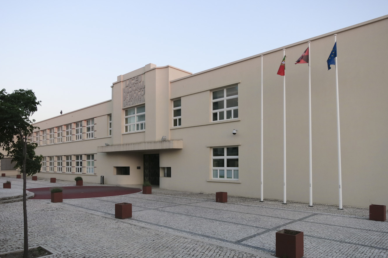 Escola Secundária Diogo de Gouveia, Beja; Arq. Luís Cristino da Silva